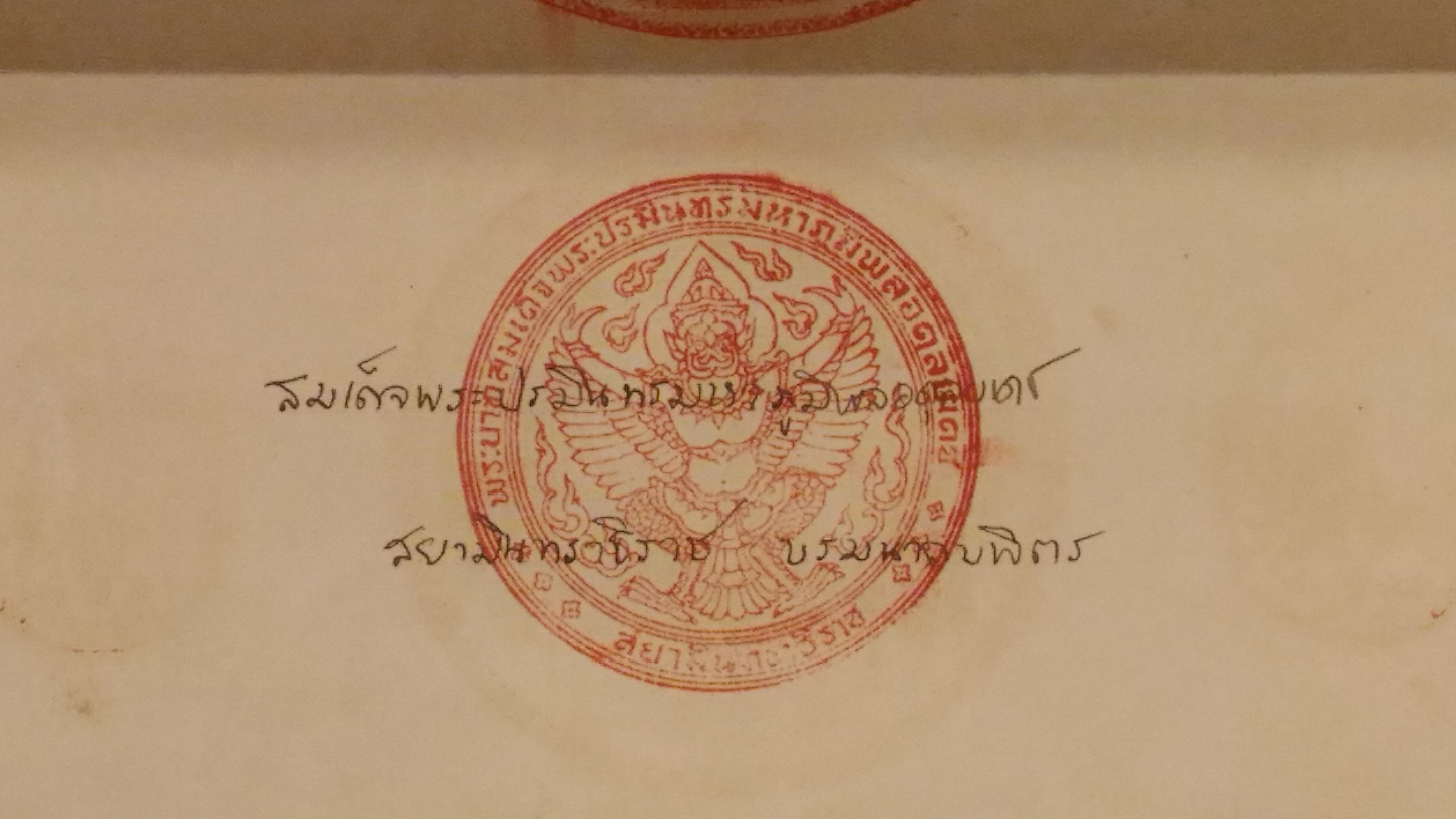 ลายพระหัตถ์ของพระบาทสมเด็จพระประมินทรมหาภูมิพลอดุลยเดช ทรงลงพระปรมาภิไธย "สมเด็จพระปรมินทรมหาภูมิพลอดุลยเดช สยามินทราธิราช บรมนาถบพิตร" ประทับกำกับด้วยพระราชลัญจกรพระครุฑพ่าห์ในรัชกาลที่ ๙ ถ่ายจากหน้าต้นขอรัฐธรรมนูญแห่งราชอาณาจักรไทย พุทธศักราช ๒๔๗๕ ฉบับแก้ไขเพิ่มเติม พ.ศ. ๒๔๙๕ สำนักงานเลขาธิการสภาผู้แทนราษฎรให้พิพิธภัณฑสถานแห่งชาติ พระนคร ยืมจัดแสดง ในงานมหกรรมพิพิธภัณฑ์ไทย Thailand Museum Expo 2016 อัศจรรย์พิพิธภัณฑ์ไทย เนื่องในวันพิพิธภัณฑ์ไทย ๒๕๕๙ ระหว่างวันที่ ๑๖-๒๑ กันยายน ๒๕๕๙